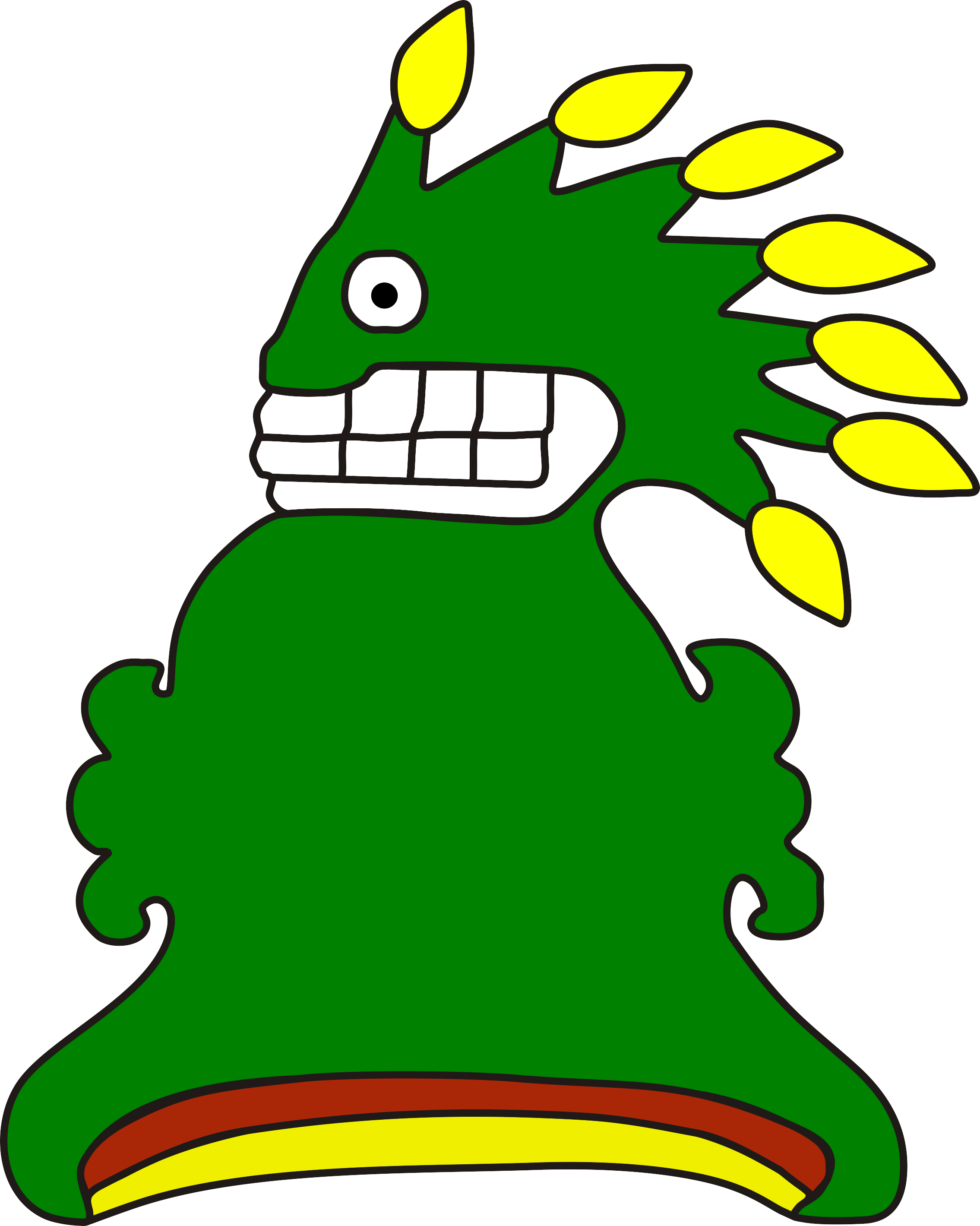 El Códice Mendocino representa el glifo de Malinaltepec con un cráneo humano sobre un cerro, donde nace una hierba que tiene frutos rojos y amarillos.